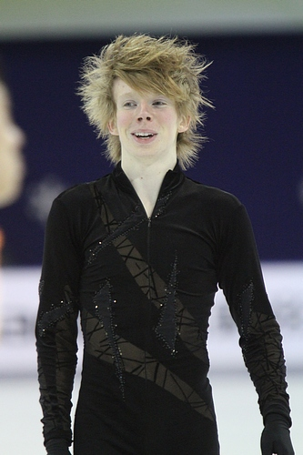 Кэвин Рейнольдс на Кубке Китая 2011.